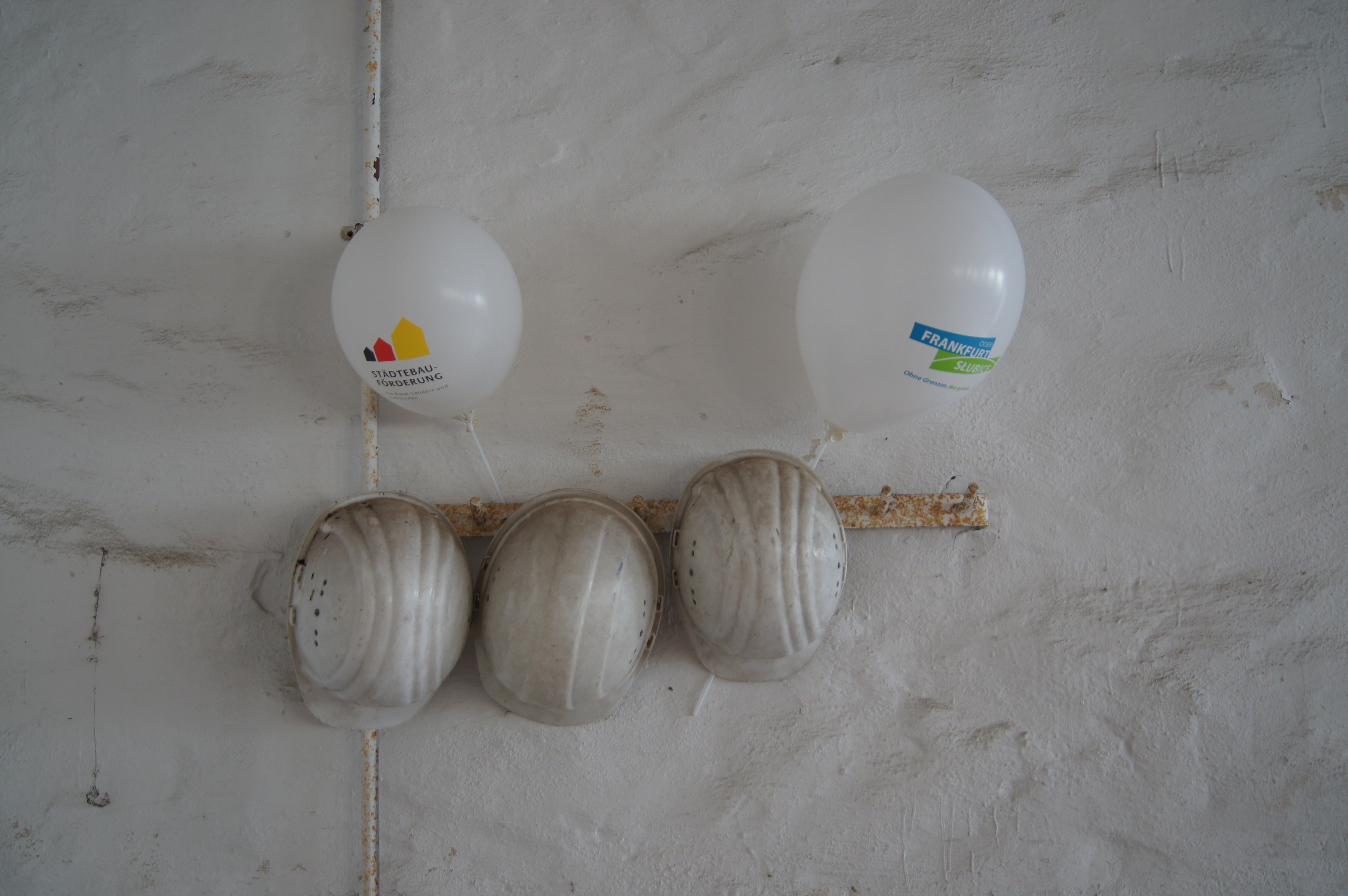 Wohn- und Kontorhaus Fürstenberger Straße 19, Frankfurt (Oder), Deutschland